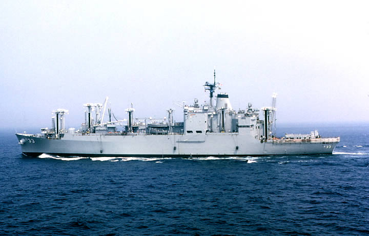 USS Shasta (AE-33) アメリカのキラウエア級給兵艦シャスタ(AE-33)